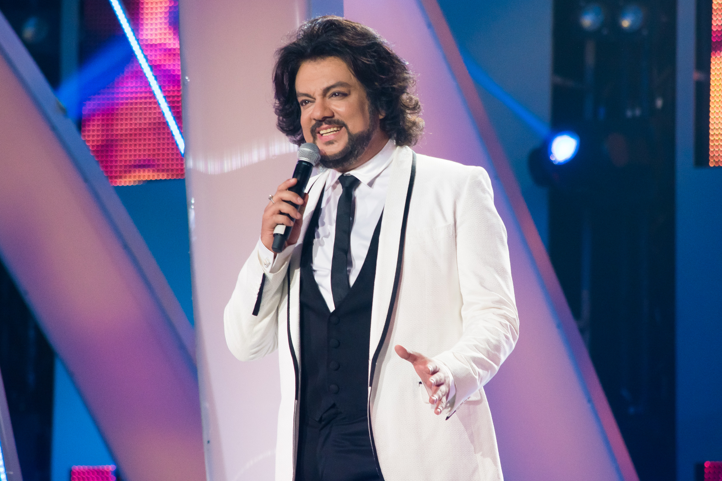 Филипп Киркоров на Рождественской Песенке года 2015